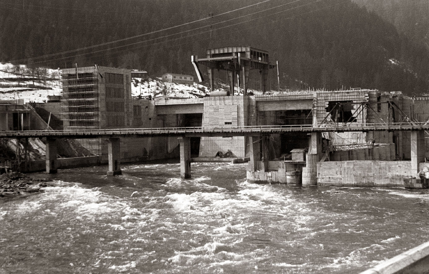 Hidroelektrarna Vuhred